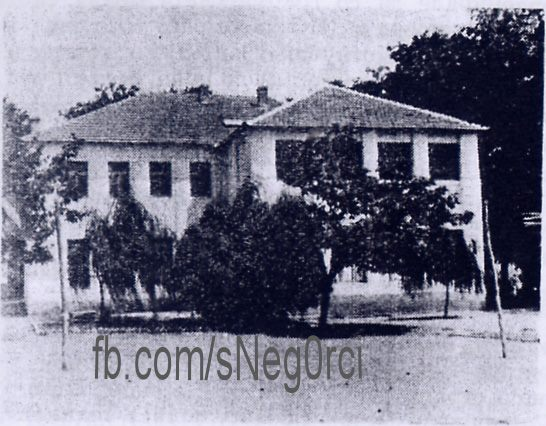 Старата училишна зграда на денешното училиште